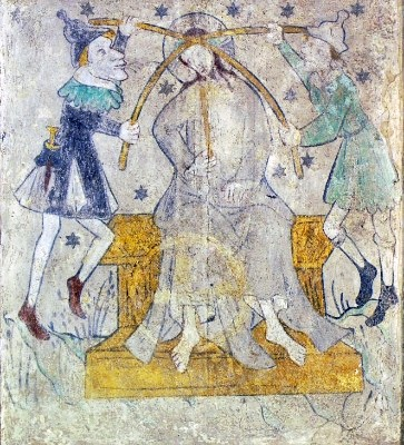 Dornenkrönung, mittelalterliche Malerei in der protestantischen Kirche Weisenheim am Berg, Rheinland-Pfalz